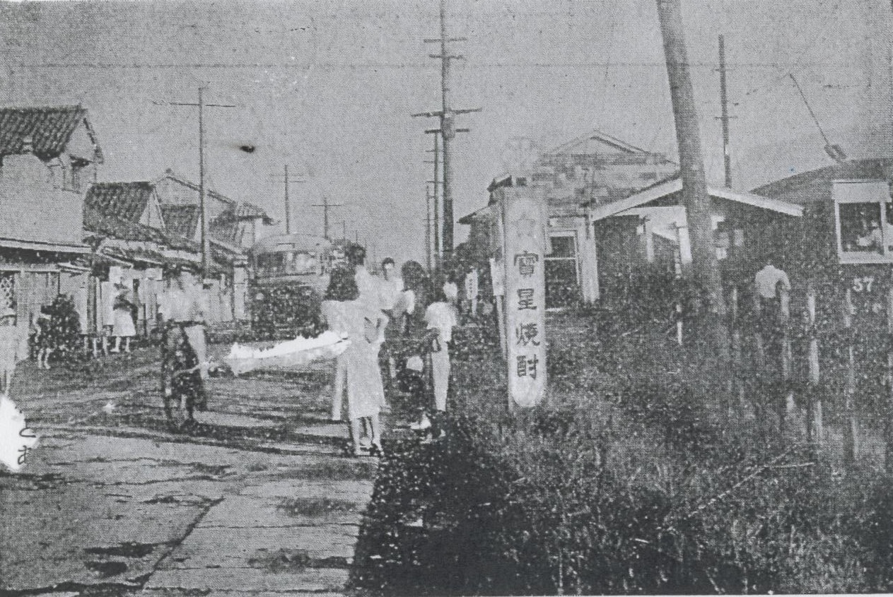 1950年以前に撮影された鹿児島市電伊敷線の終点伊敷電停付近。（伊敷村誌の説明には「栄門通（伊敷電車終点）」との記述がある）